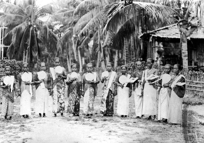 Repronegatief. Parigische danseressen, Celebes